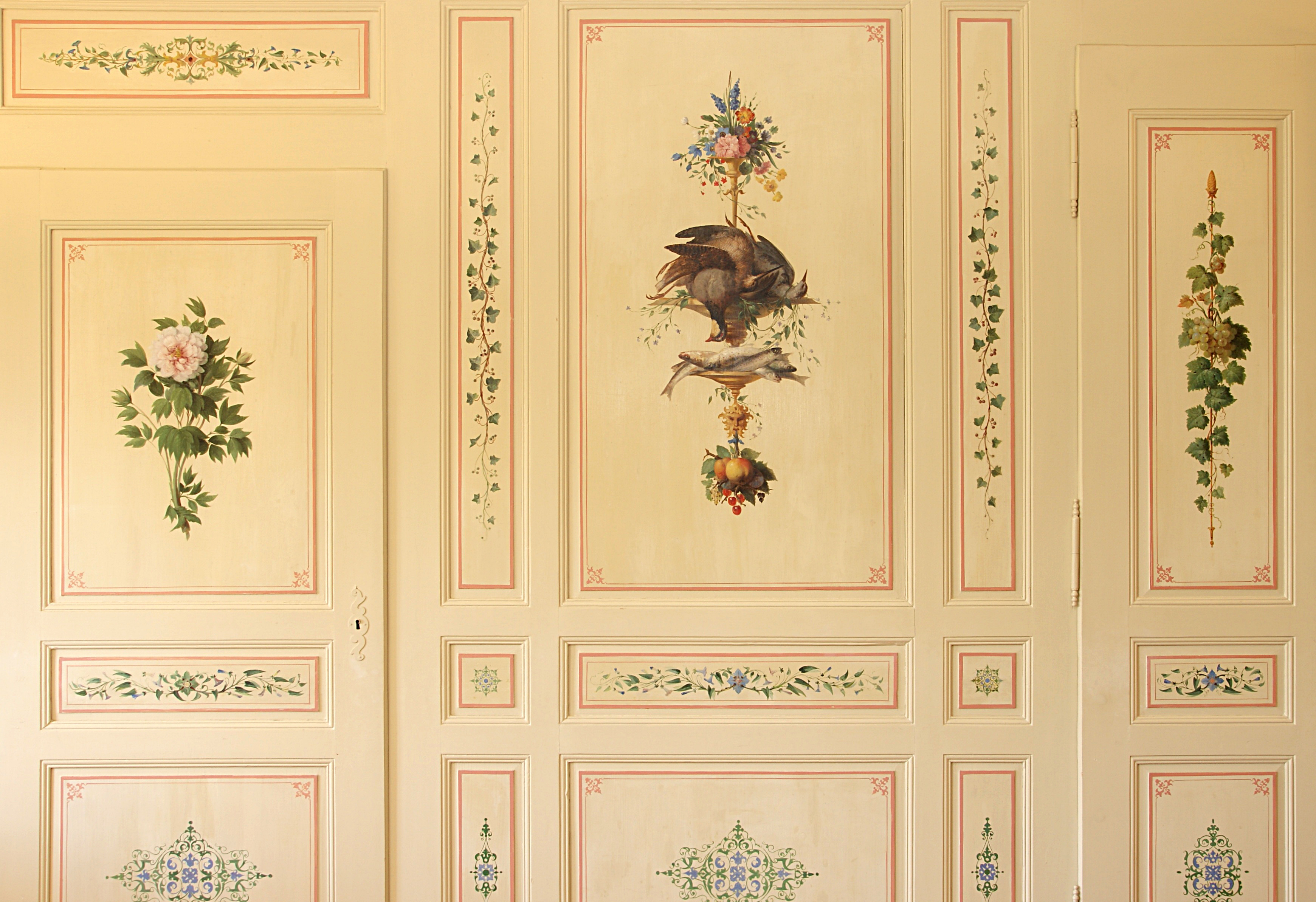 Foto einiger Dekorationsmalereien eines unbekannten Künstlers im ehemaligen Speisezimmer von Schloss Löwenberg, entstanden um 1840.